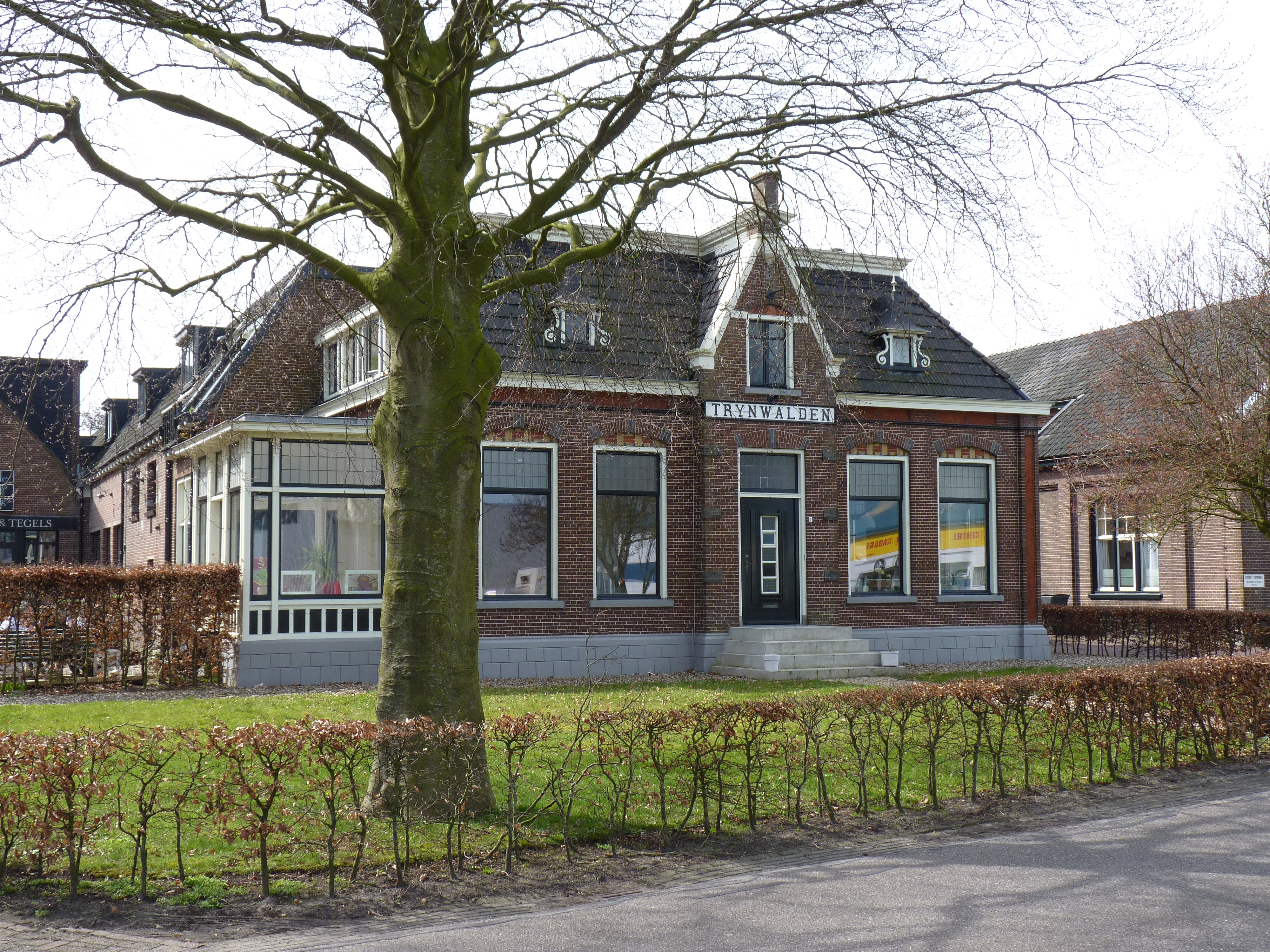 Giekerk Directeurswoning